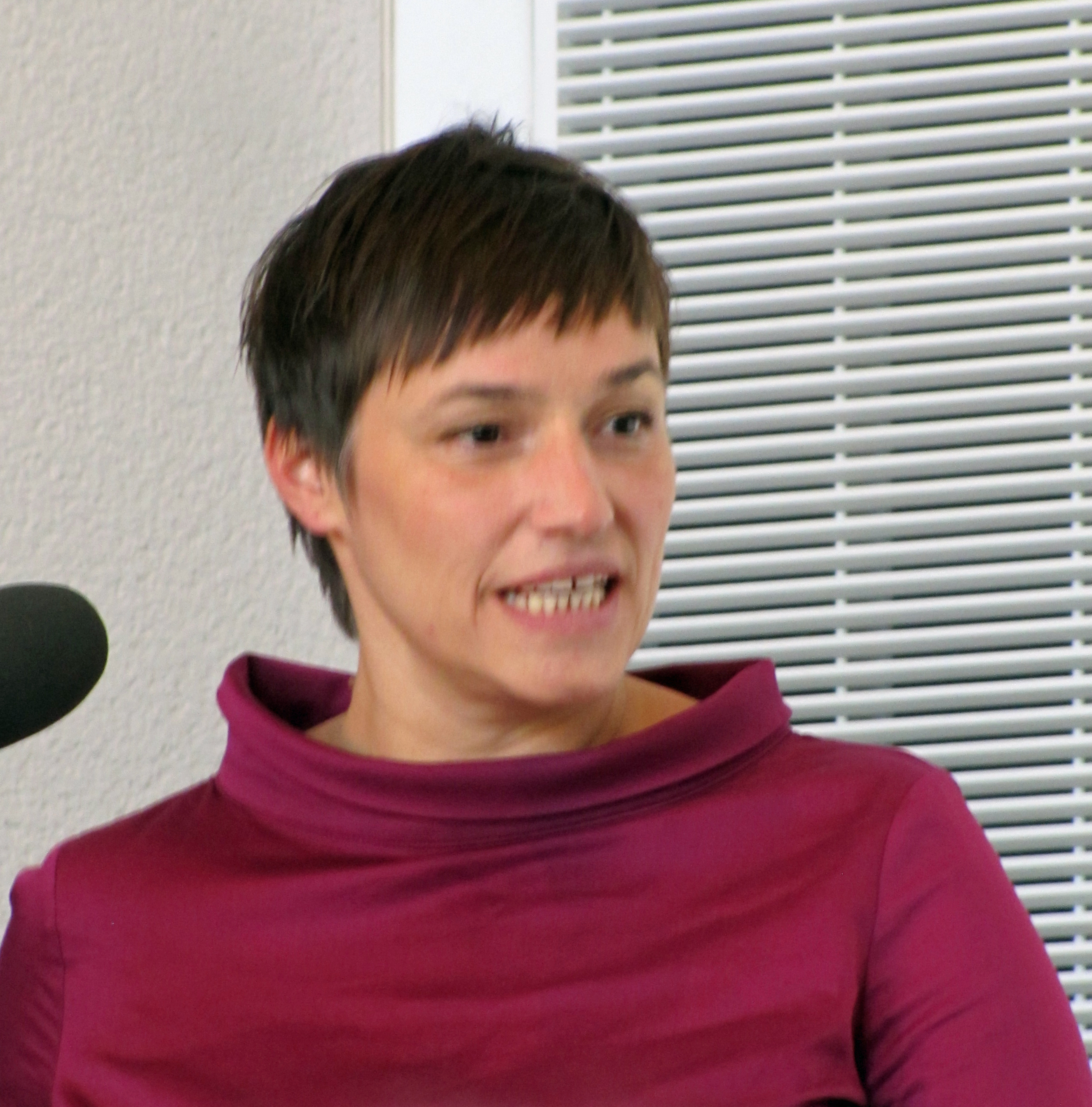 Nicole Deitelhoff, bei den 46. Römerberggesprächen, Thema: Die neue Lust an der Zerstörung – oder wie die Demokratie ihre Fassung bewahrt", im November 2018 im Chagall-Saal der Städtischen Bühnen in Frankfurt am Main.